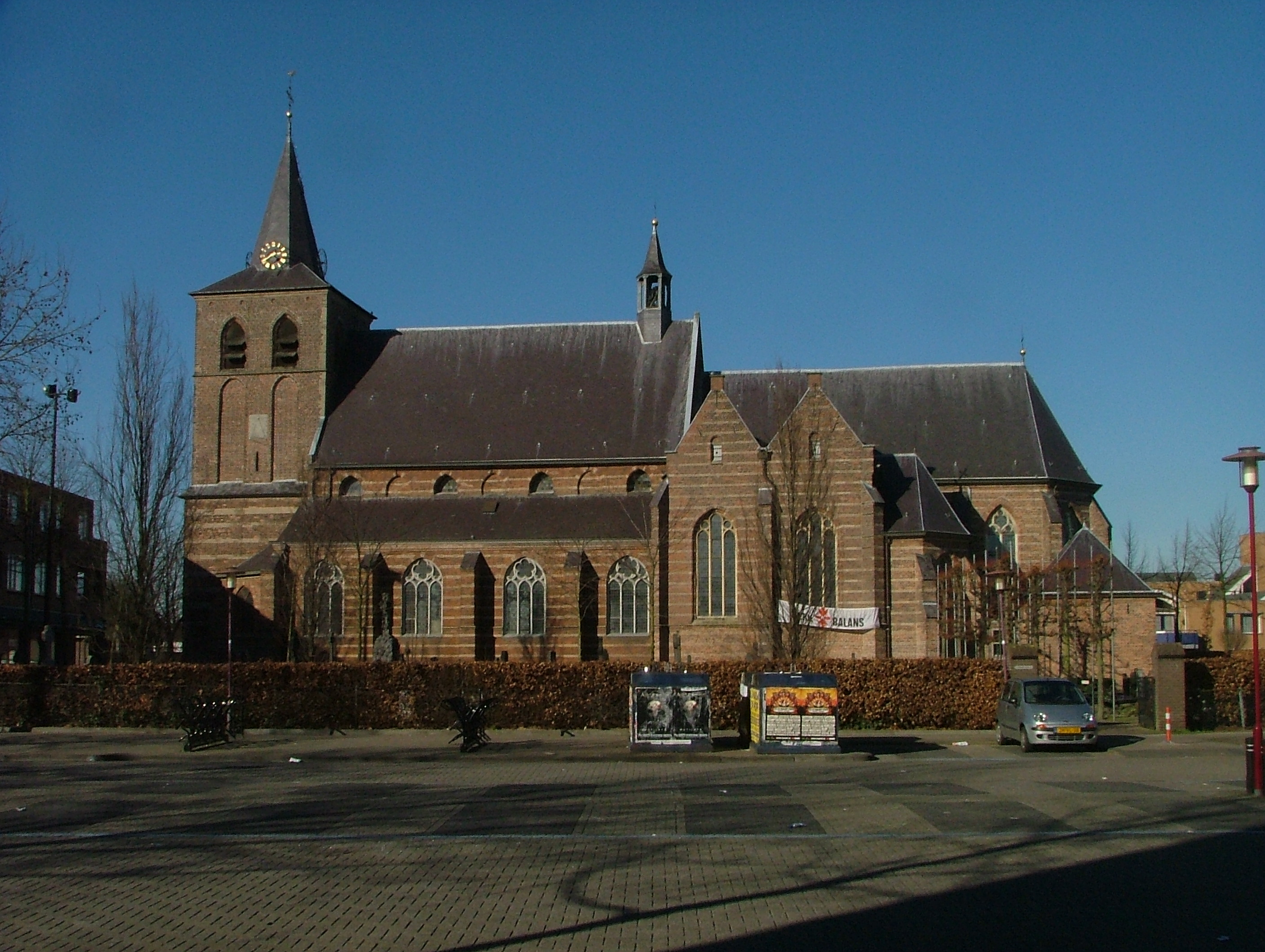 Sint-Lambertuskerk Categorie:Afbeelding Rosmalen